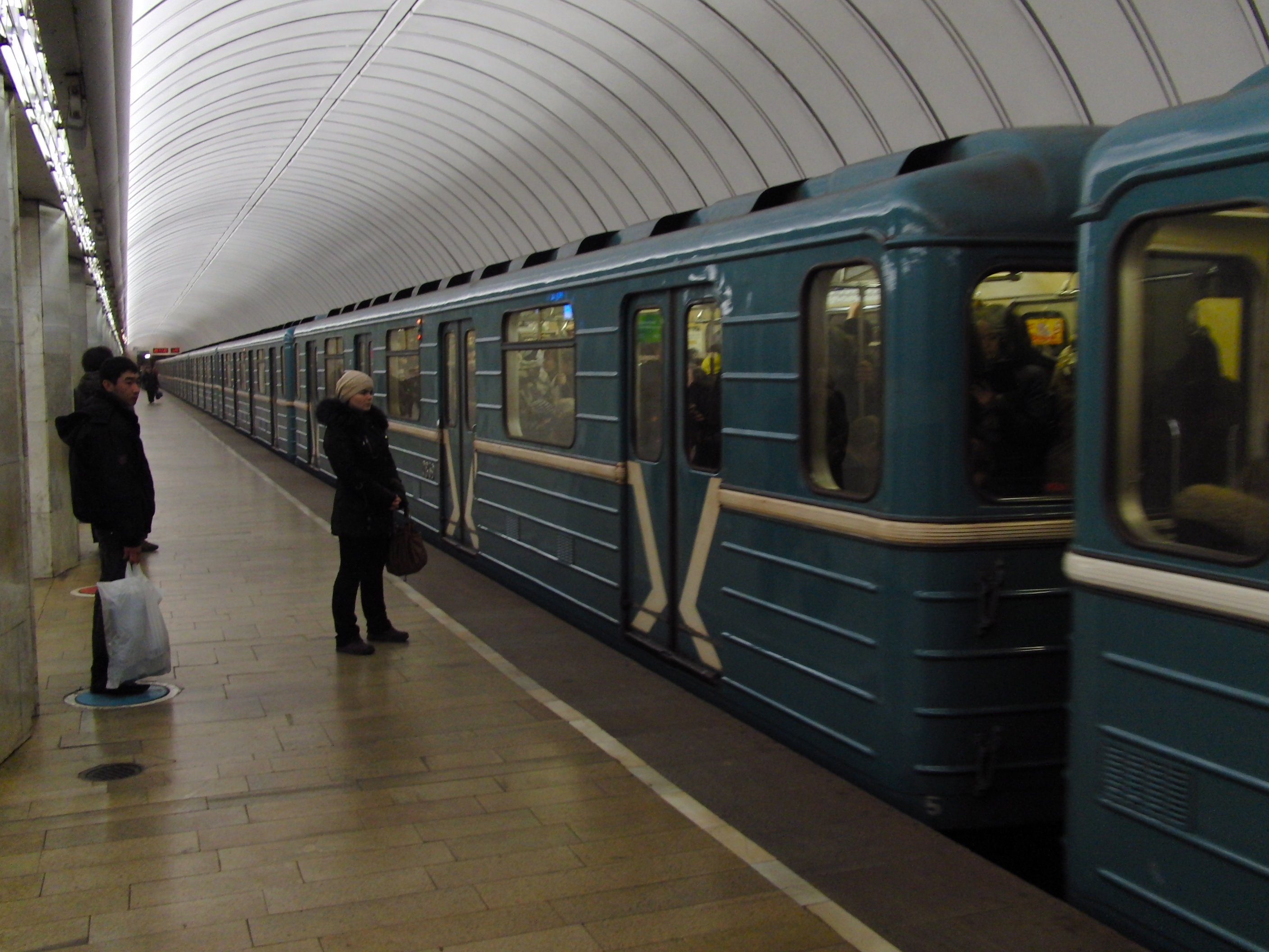 Petrovsko-Razumovskaya (Петровско-Разумовская)